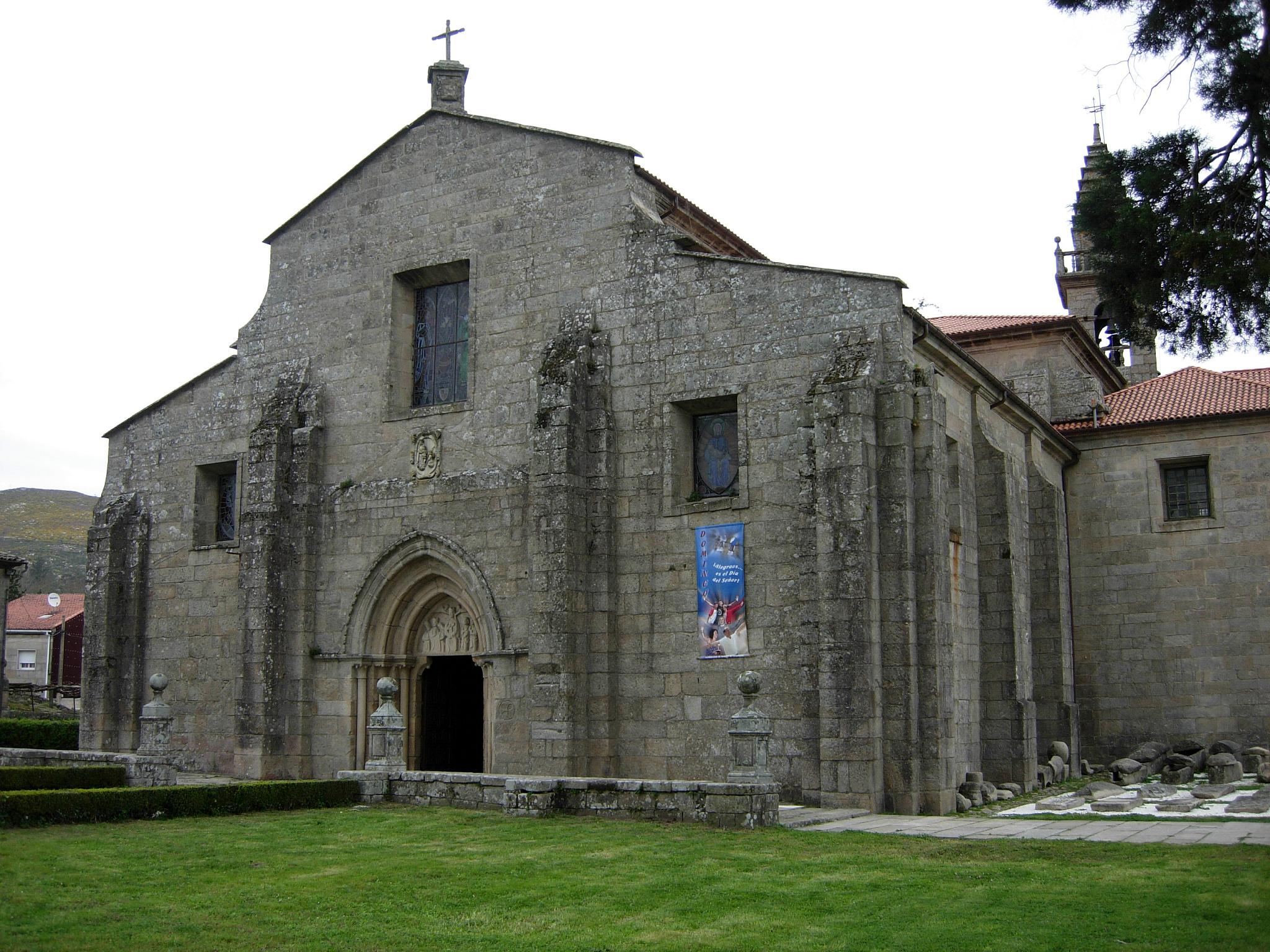 Igrexa de Santa María de Iria Flavia, Padrón